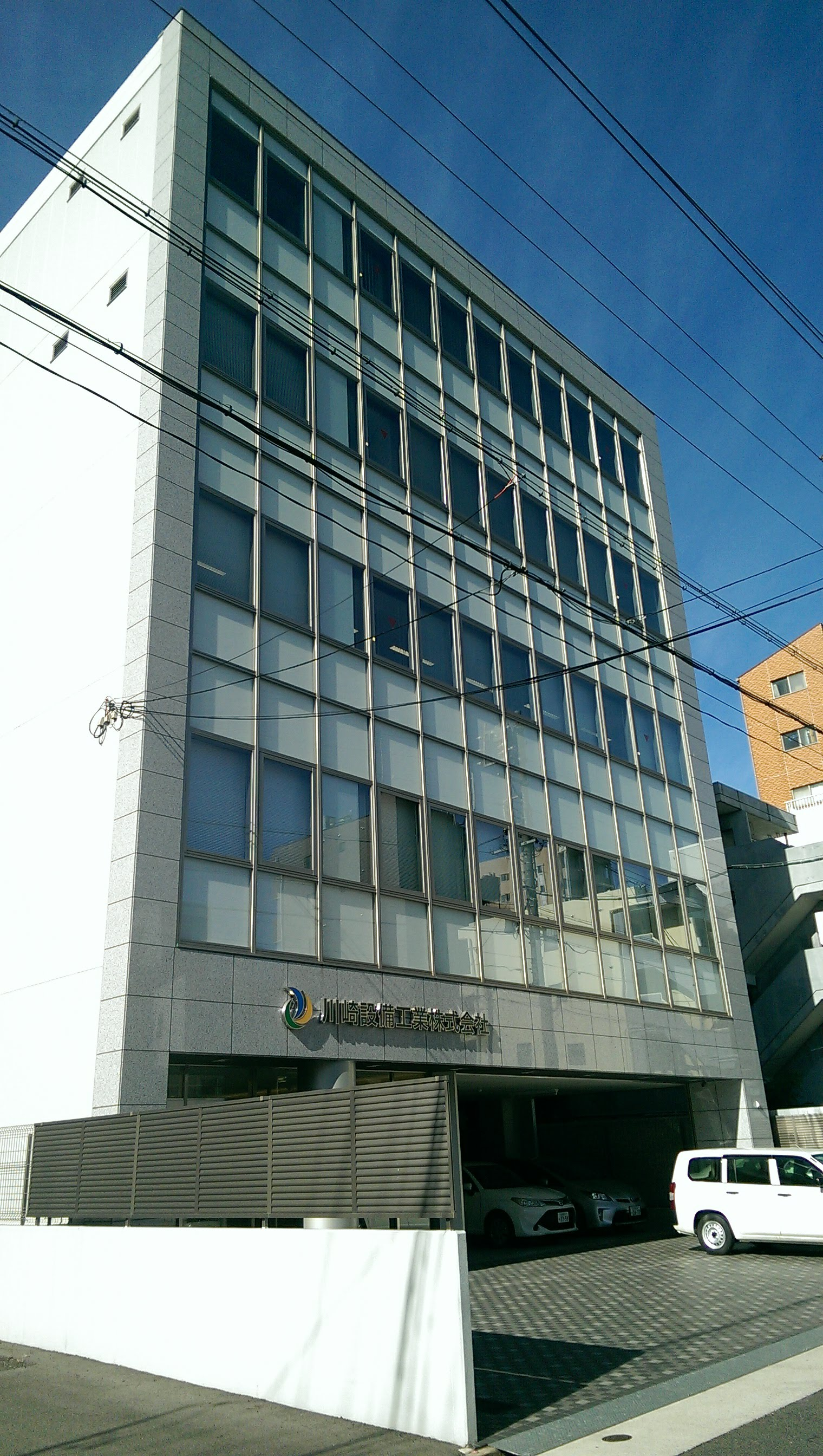 名古屋市中区大須一丁目の川崎設備工業の本社